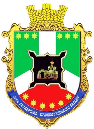 герб с. Октябрське (Красноградський район)